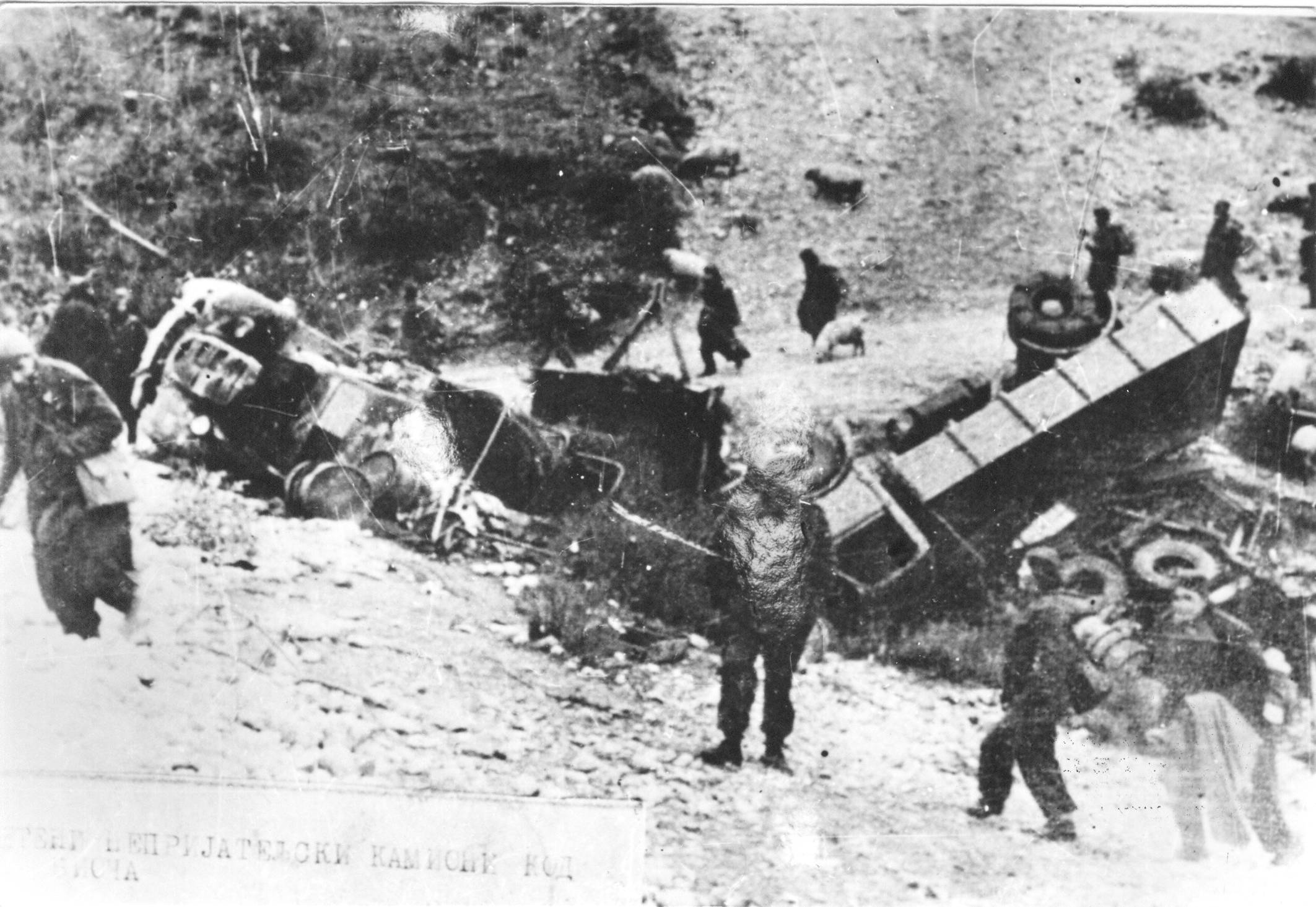 Srpskohrvatski / српскохрватски: Uništena motorizovana kolona 21. oklopnog korupsa prilikom proboja iz okruženja u Crnoj Gori, jesen 1944.